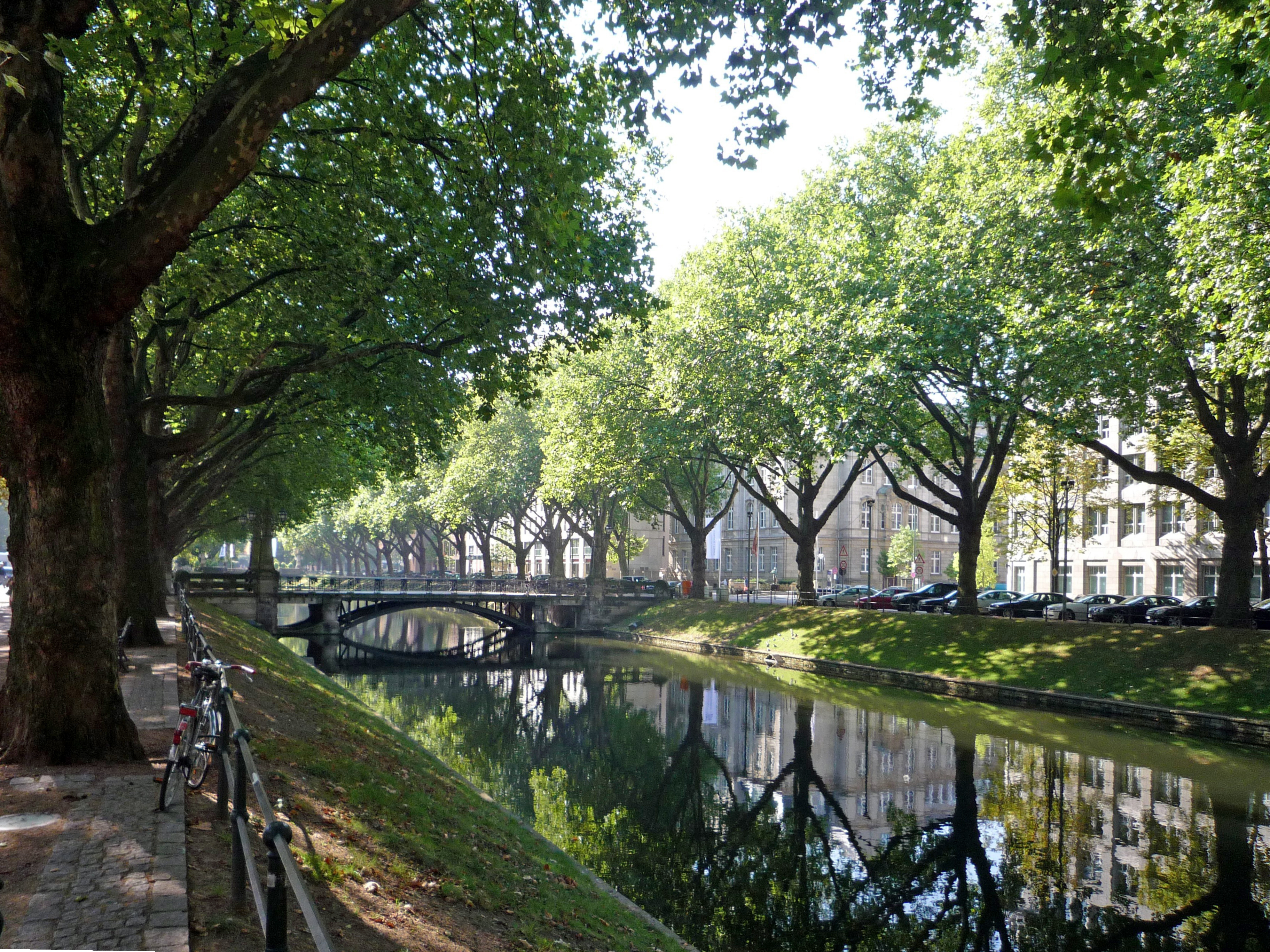 Dusseldorf Konigsallee